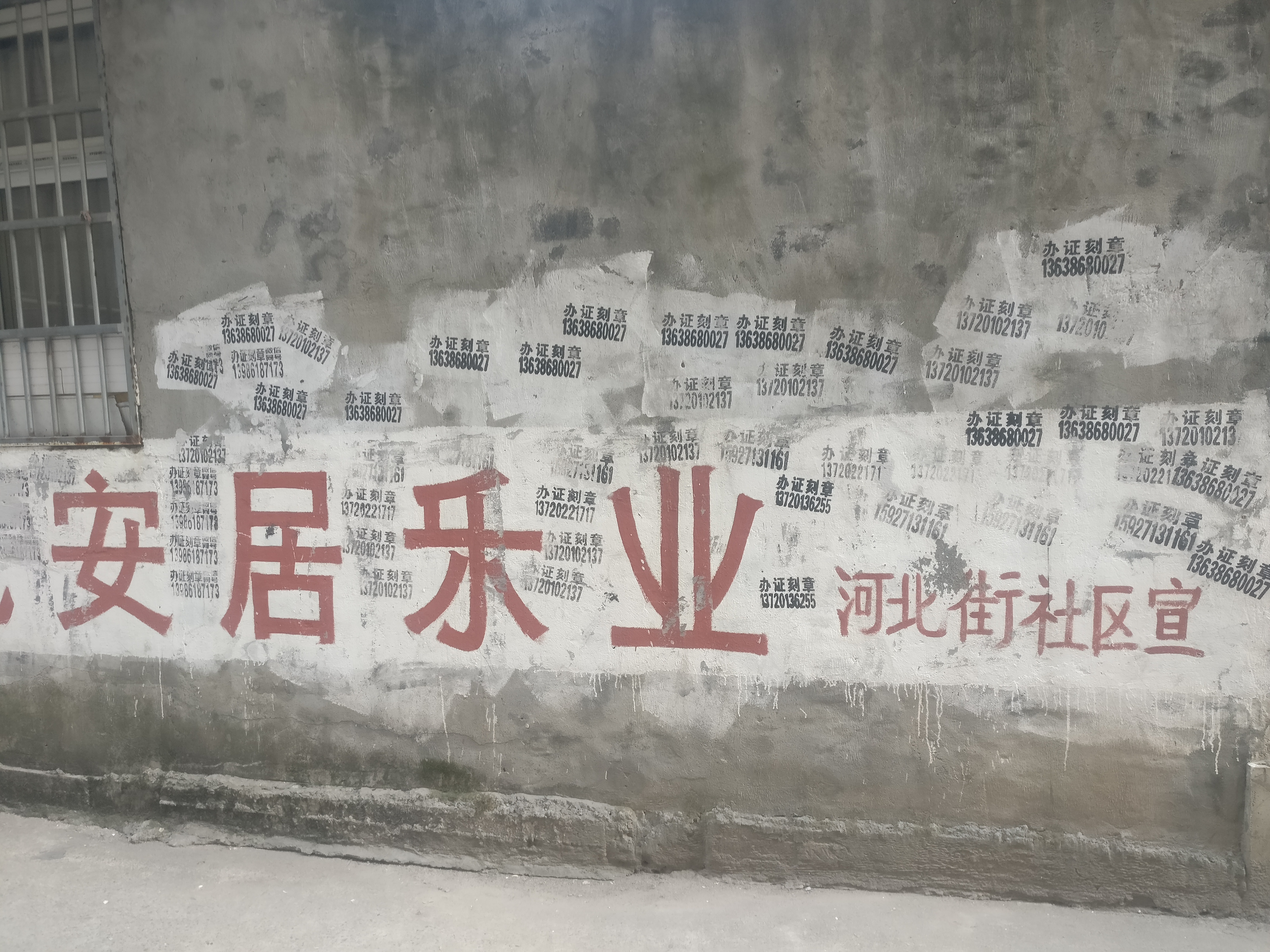 赤壁市河北大道